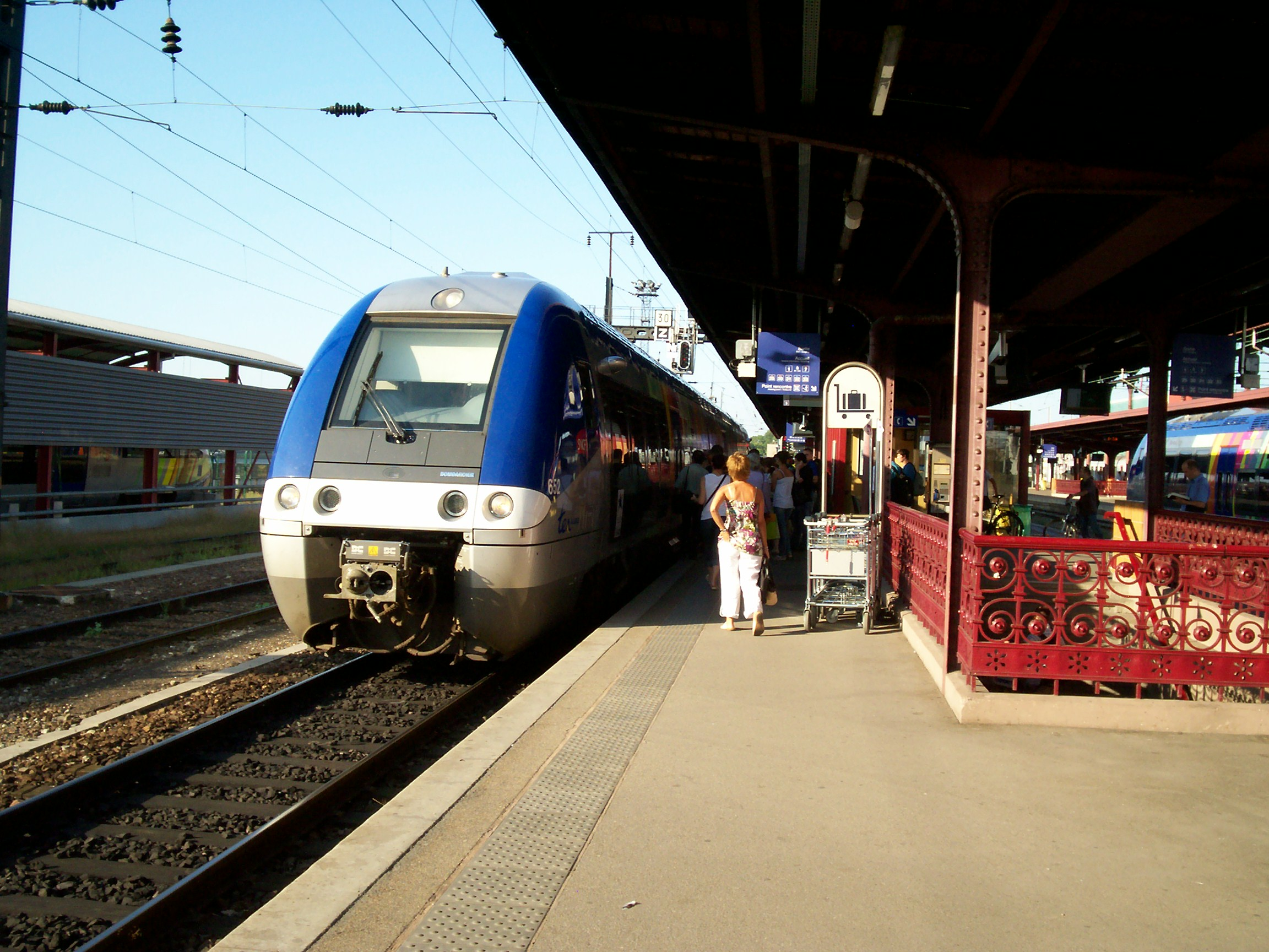 X 76500 TER Alsace